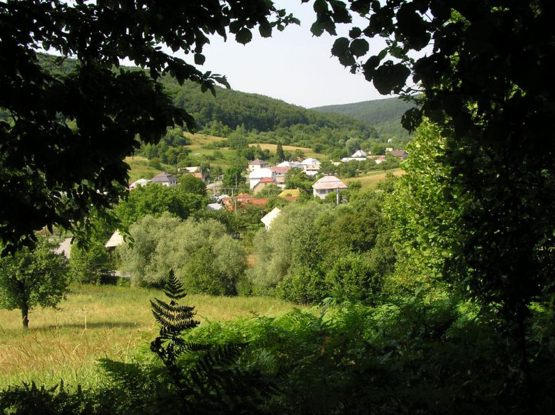 Celkový pohľad